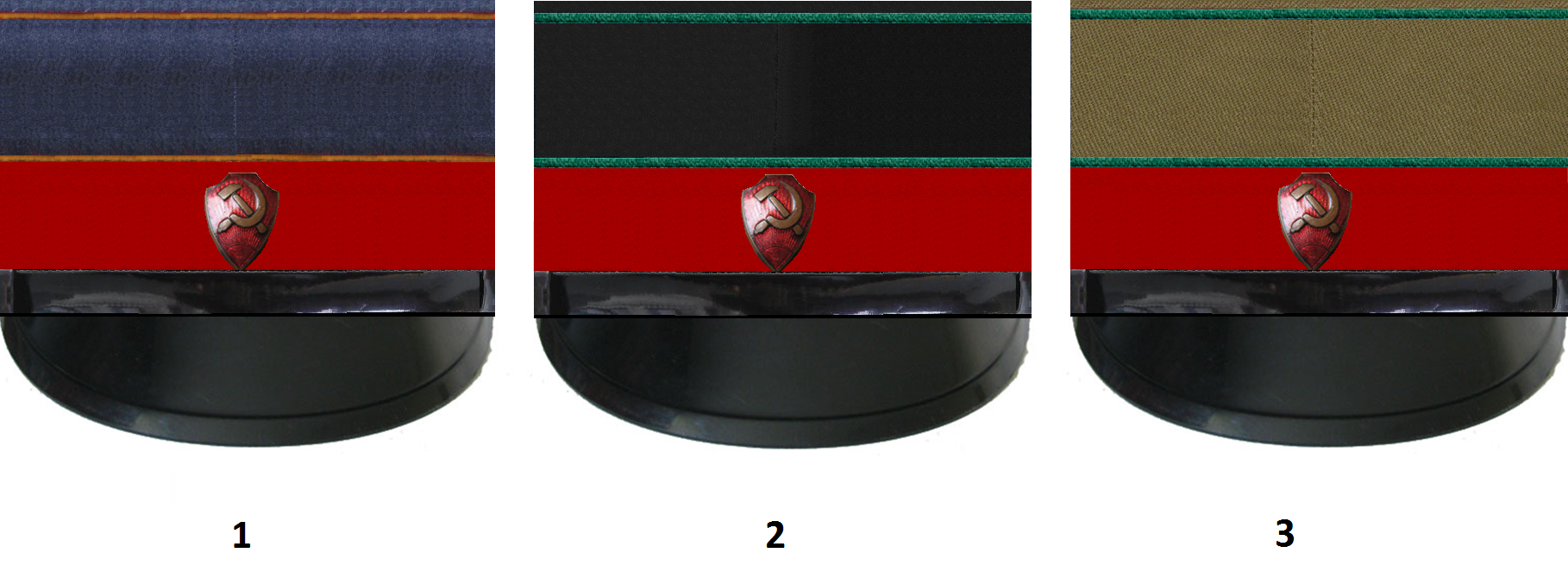 Фуражки милиции28